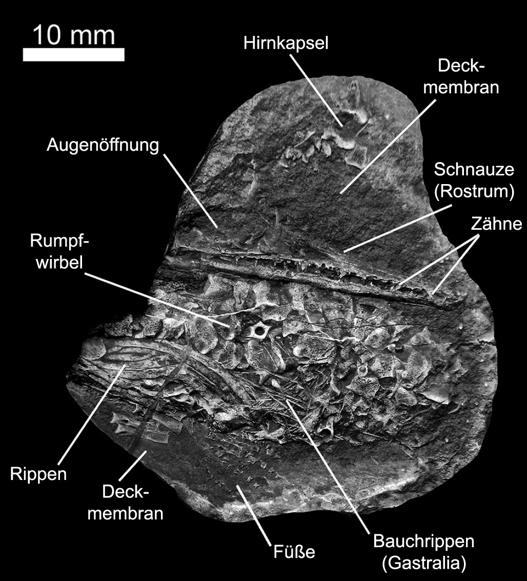 Isolierter, voll artikulierter Fötus von Mesosaurus tenuidens in fortgeschrittenem (terminalem?) Entwicklungsstadium (Exemplar-Nr.: FC-DPV 2504), Mangrullo-Formation (Artinsk, Unterperm) von Uruguay. Die Bezeichnung „Deckmembran“ (im Original „cover membrane“) bezieht sich auf die offenbar unmineralisierte Schale/Hülle des abgelegten Eis. Für detaillierte (partielle) Beschreibungen des Fossils siehe Piñeiro et al. (2012:622–624)[1] und Piñeiro et al. (2016:9–11)[2].Anmerkung: FC-DPV 2504 ist nach Angaben von Piñeiro et al. (2012) eigentlich ein Abdruckfossil (engl. external mould; vgl. dazu auch Abb. S1 in Piñeiro et al. (2016)[3]), wohingegen das Stück hier positiv reliefiert wirkt. Es handelt sich daher möglicherweise um einen Latexabguss (oder evtl. auch um ein digital bearbeitetes Graustufen-Negativ). In der Quellpublikation (Laurin & Piñeiro, 2017; für bibliographische Einzelheiten dem unten angeführten Quellenlink folgen) finden sich dazu keine Angaben. ↑ Graciela Piñeiro, Jorge Ferigolo, Melitta Meneghel, Michel Laurin: The oldest known amniotic embryos suggest viviparity in mesosaurs. Historical Biology. Bd. 24, Nr. 6, 2012, S. 620–630, ↑ Graciela Piñeiro​, Pablo Núñez Demarco, Melitta D. Meneghel: The ontogenetic transformation of the mesosaurid tarsus: a contribution to the origin of the primitive amniotic astragalus. PeerJ. Bd. 4, 2016, Art.-Nr. e2036, ↑ auf Commons gehostet unter Mesosaurus fetus Pineiro et al (2016) PeerJ 4-e2036 fig S1.png